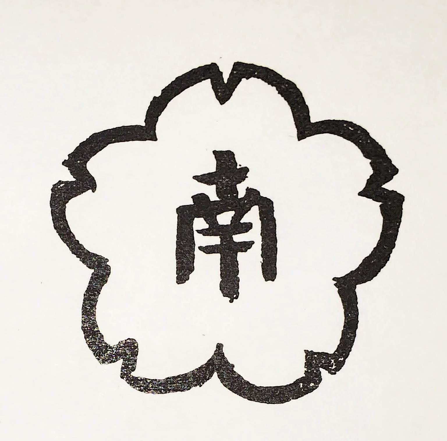 南地五花街 紋章